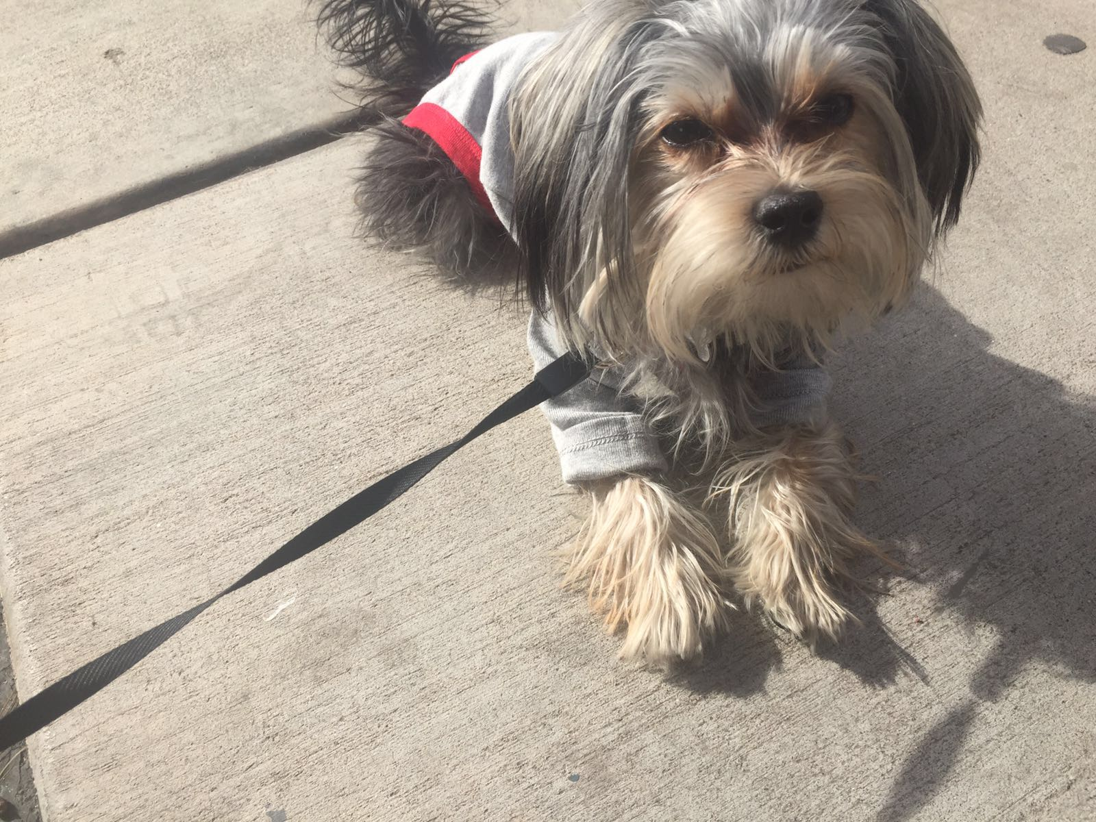 כלב מסוג מורקי